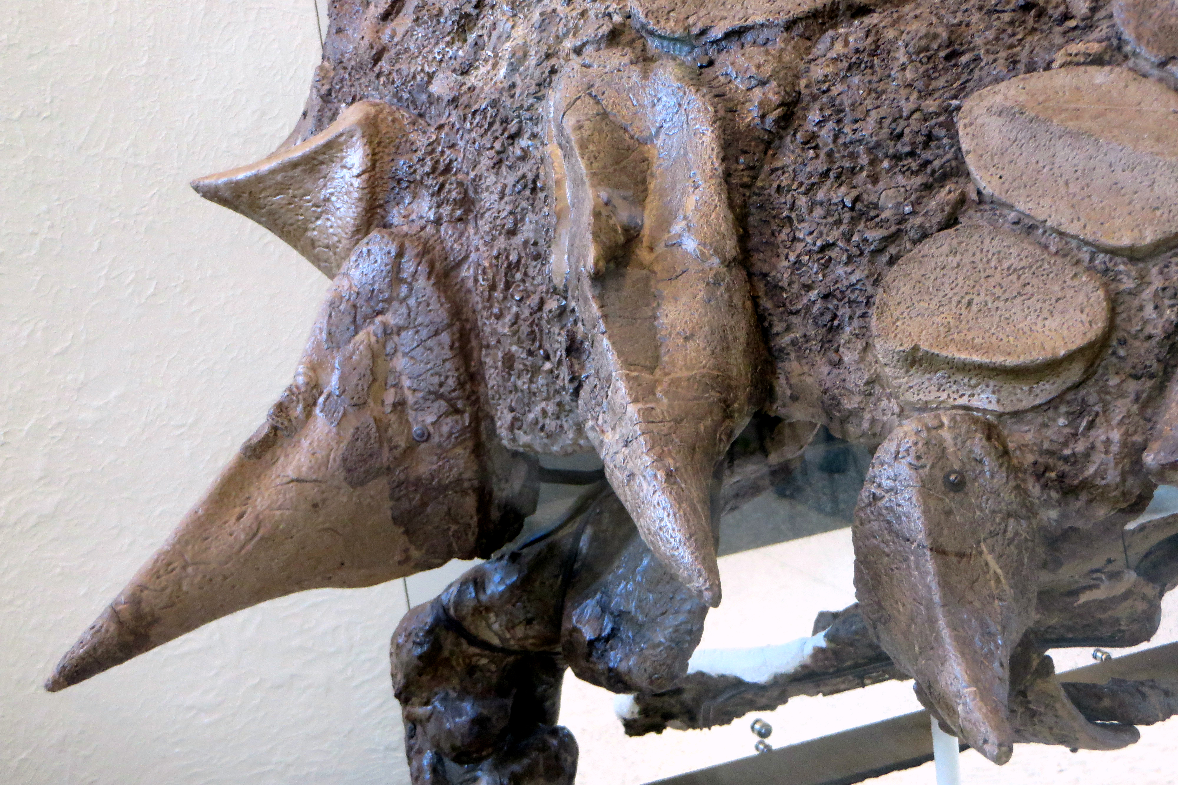 Ankylosaur Spikes